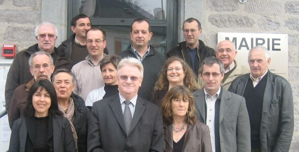 Elus conseil